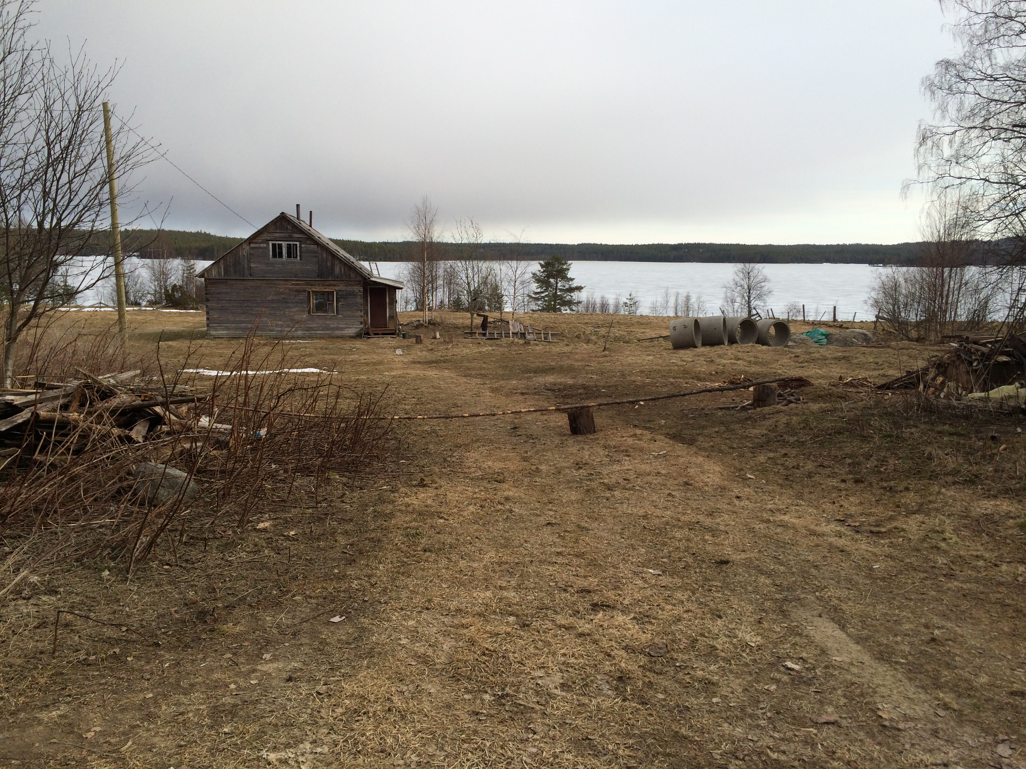 Тунгозеро (пос)